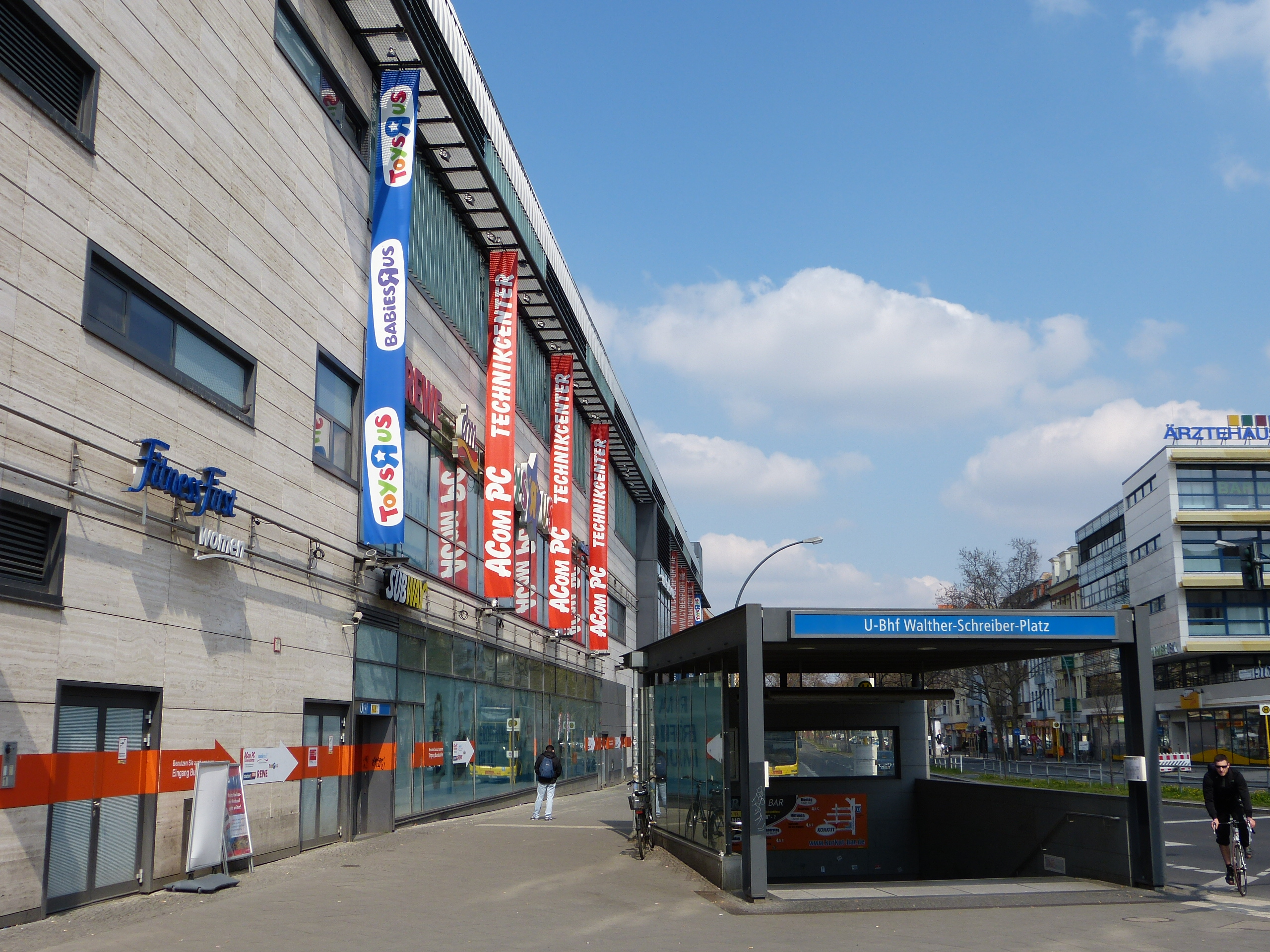 Eingang zur U-Bahn am Walther-Schreiber-Platz, Berlin-Friedenau